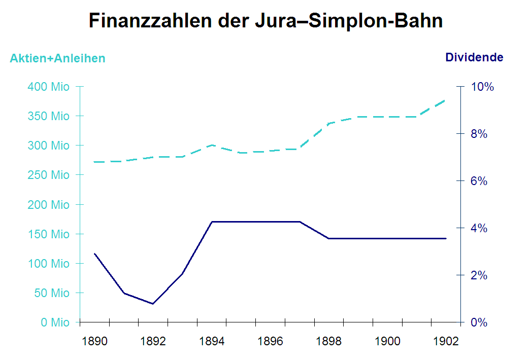 Aktienkapital und feste Anleihen sowie Dividende Aktien sind Anteile am Grundkapital des als Aktiengesellschaft konstituierten Bahnunternehmens. Sie sind hier im Nennwert angegeben, der jedoch in keiner Weise dem Kurswert entsprechen muss. Viele Bahnen haben im Laufe der Zeit ihr Aktienkapital erhöht, was gewöhnlich auf eine Expansion der Bahn hindeutet. Eine Verminderung des Aktienkapitals wurde bei finanziellen Schwierigkeiten vorgenommen, indem durch Herabsetzung des Nennwerts der Aktien Kapital für das Unternehmen freigesetzt wurde (sogenannter Kapitalschnitt). Feste Anleihen waren neben Aktien die wichtigste Form der Geldbeschaffung für die Bahnen. Das vom Unternehmen aufgenommene Kapital wird über eine bestimmte Laufzeit zu einem bestimmten Zinssatz verzinst. Die Zinslast für Anleihen war ein gewichtiger Ausgabeposten insbesondere der grossen Bahnen. Wenn wegen zu geringen Erträgen die Zinsen nicht mehr bezahlt werden können, droht der Konkurs. Die Dividendenauszahlungen für die Aktionäre sind hier im Verhältnis zum Nennwert der Aktien angegeben.